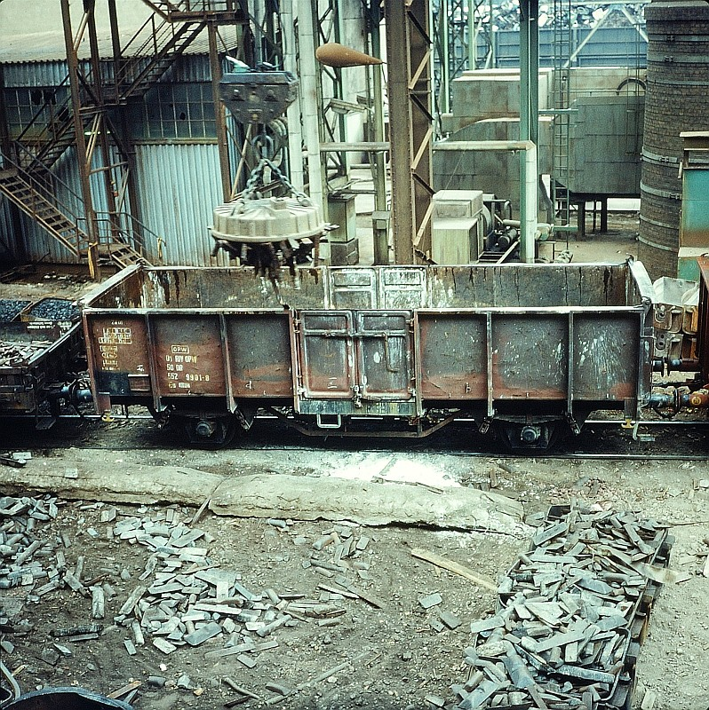 Original image description from the Deutsche Fotothek Facharbeiter für Eisenbahntransporttechnik